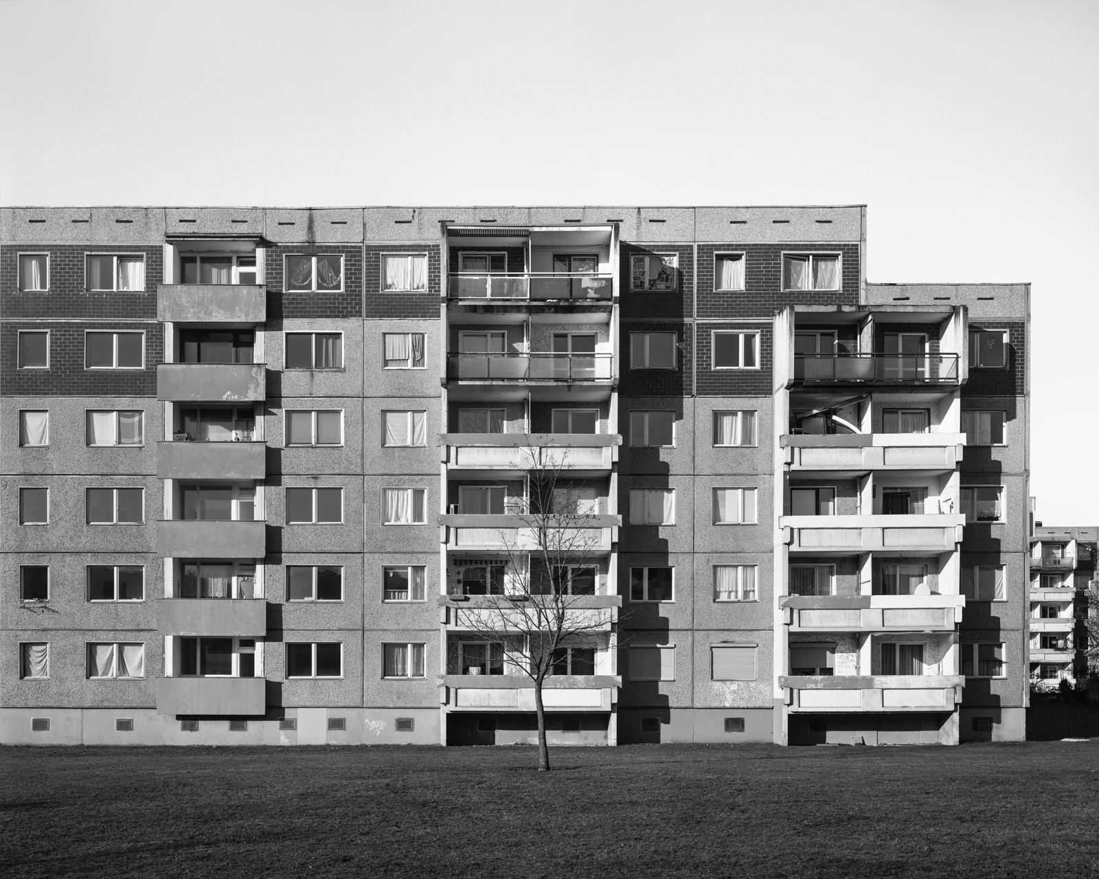 Budynek z wielkiej płyty typu WBS70 (Wohnungsbausystem 70) w Halle w dzielnicy Silberhöhe. Typ WBS70 powstał w Niemieckiej Republice Demokratycznej w 1970 roku i był wzorcem przy projektowaniu polskiego typu W70.